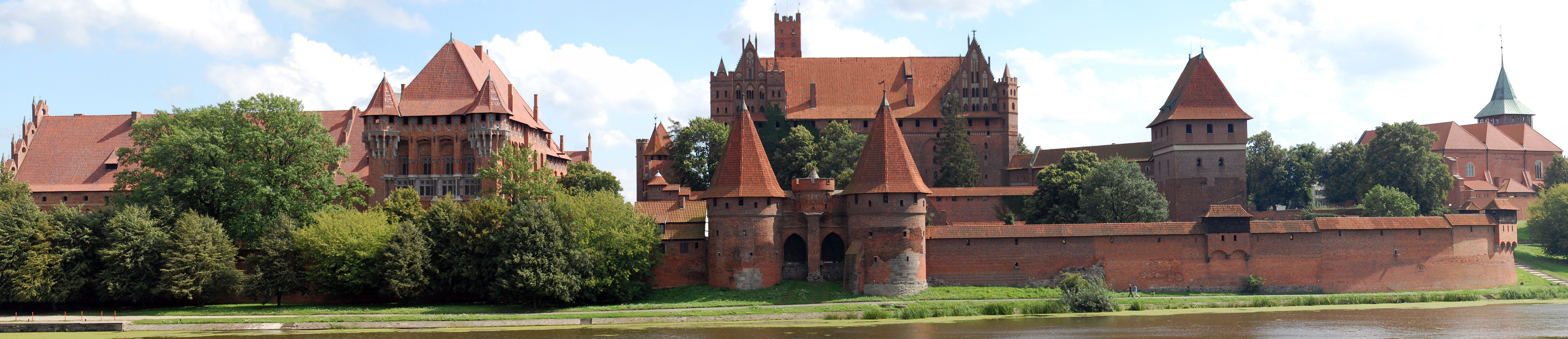 Zamek krzyżacki nad rzeką Nogat w Malborku.